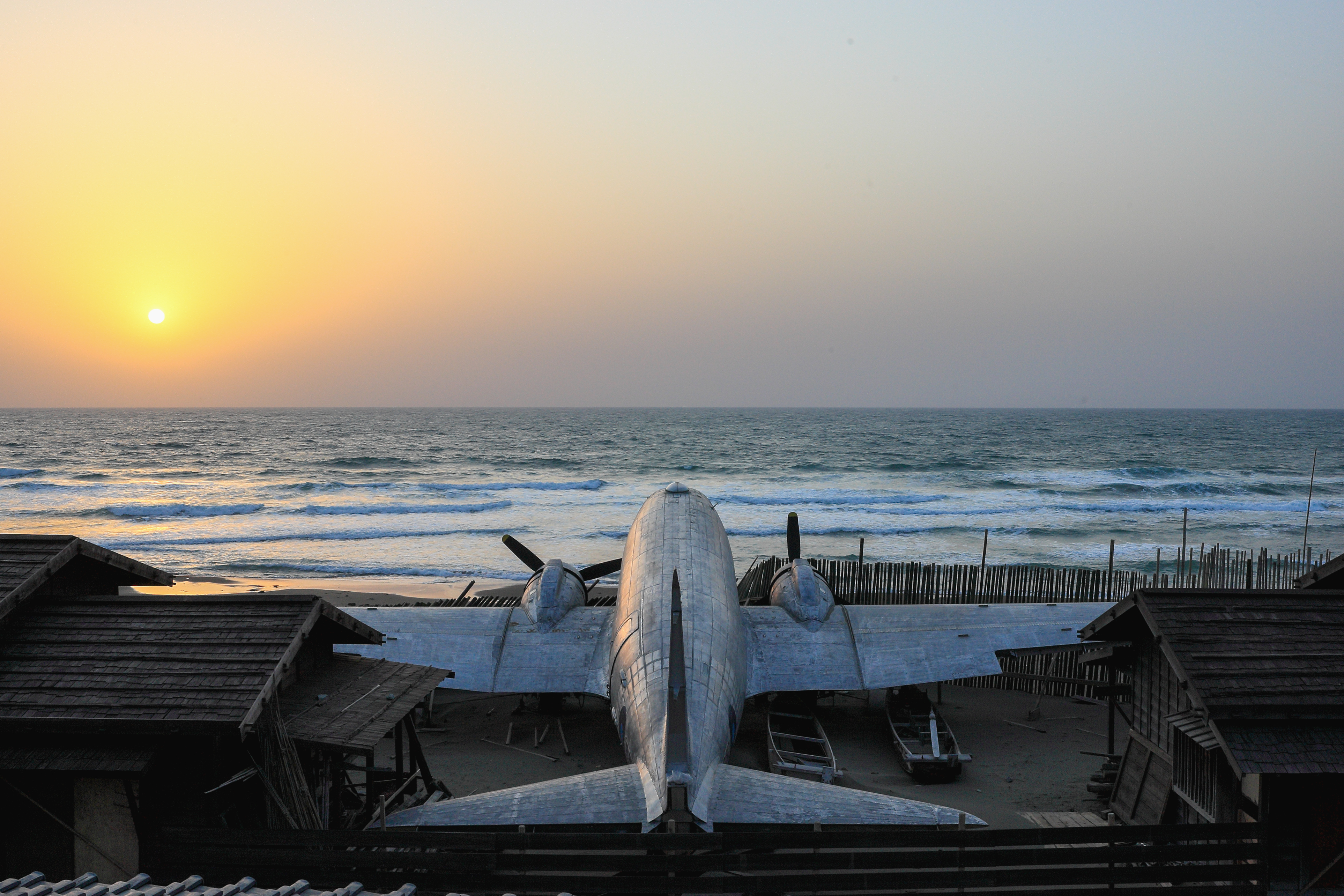 映画「飛べ!ダコタ」撮影のために、新潟県佐渡市（旧羽茂町）佐渡市小木堂釜の素浜海岸に置かれた、元USAF DOUGLAS AC-47D C-47B-1-DK 43-48501 同映画のモデルになったイギリス空軍 DOUGLAS DC-3 C-47A-50DL “SISTER ANN” C/N10028 FL510のレプリカ塗装になっている